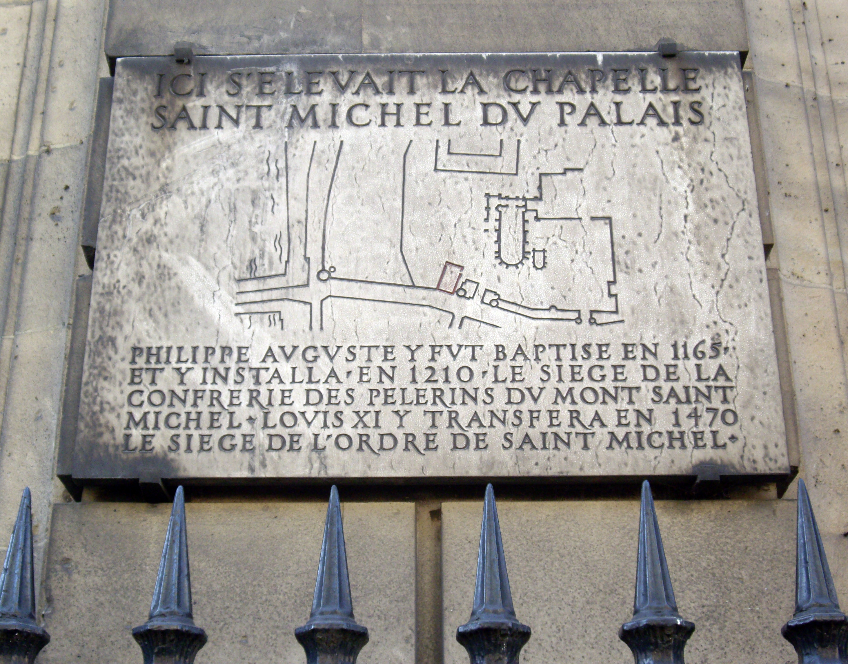 Plaque apposée sur le mur du Palais de Justice, boulevard du Palais, près du quai des Orfèvres, Paris 1er.Texte : ICI S'ELEVAIT LA CHAPELLE SAINT MICHEL DU PALAIS. PHILIPPE AUGUSTE Y FUT BAPTISE EN 1165 ET Y INSTALLA EN 1210 LA CONFRERIE DES PELERINS DU MONT SAINT MICHEL. LOUIS XI Y TRANSFERA EN 1470 LE SIEGE DE L'ORDRE DE SAINT MICHEL.